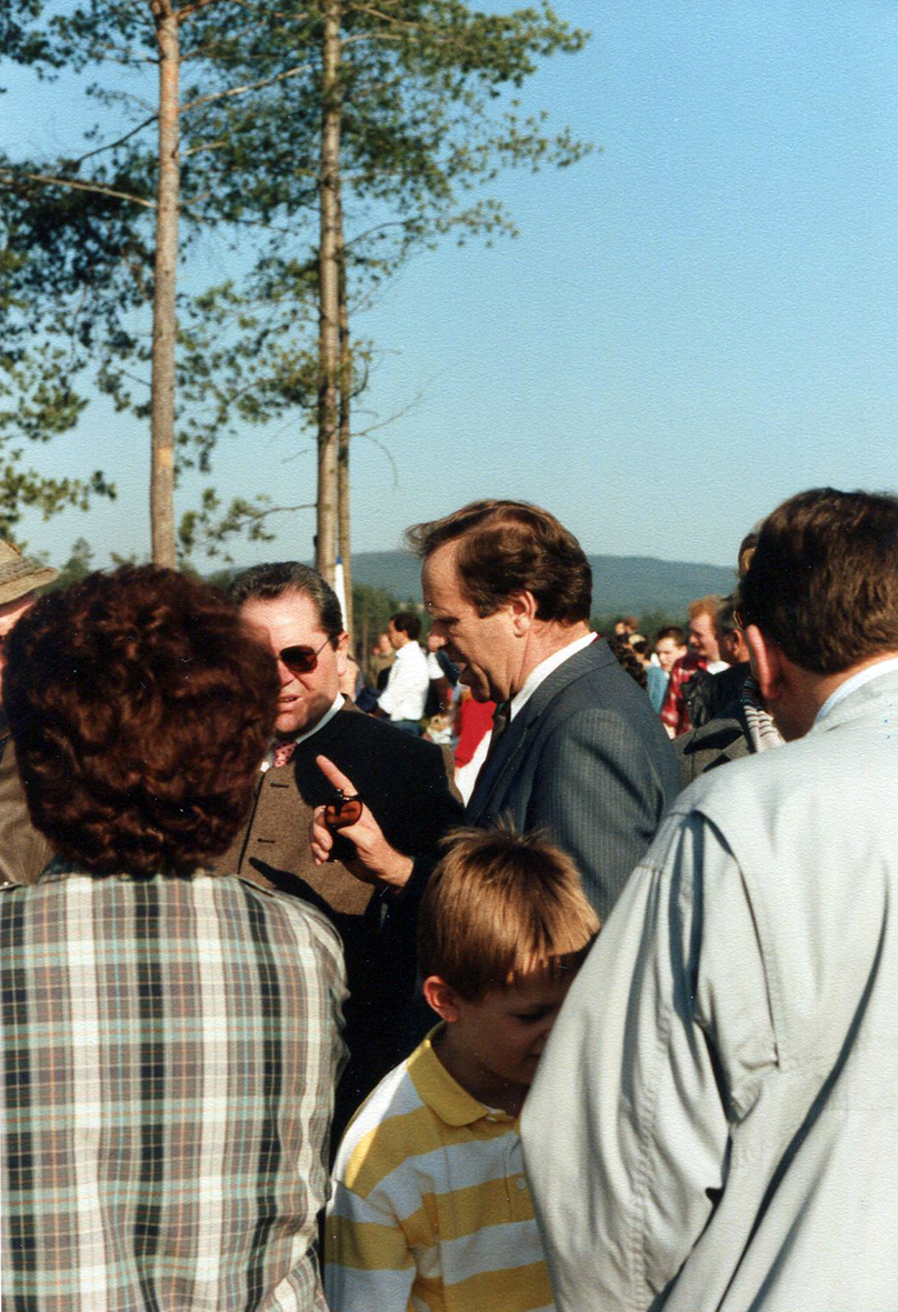 Ehem. Schwandorf SPD-Landrat Hans Schuierer, März 1989 auf dem WAA-Gelände